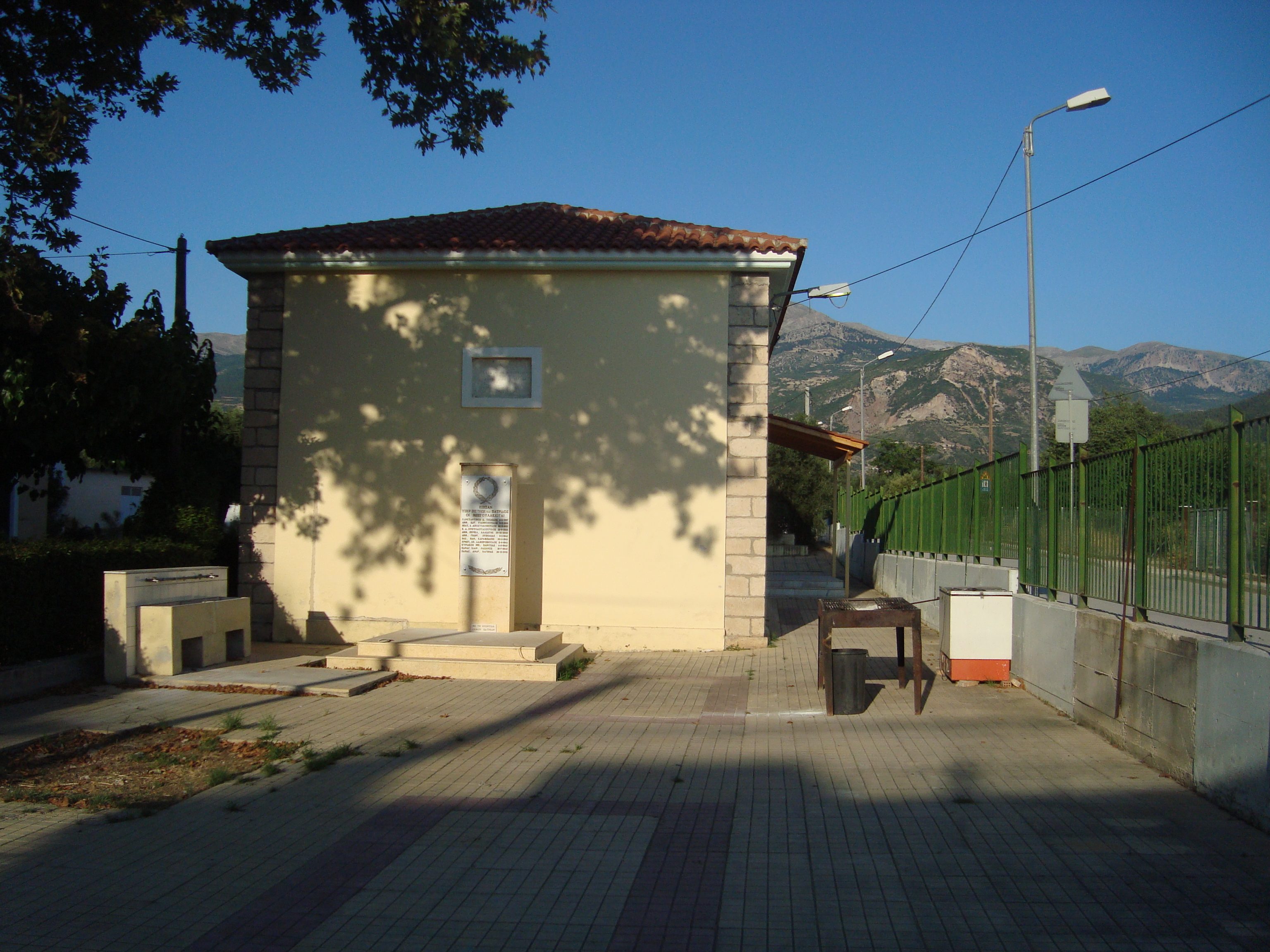 Το παλιό σχολείο του Μπεγουλακίου στην Πάτρα και το μνημείο ηρώον , η πινακίδα γράφει οτι το σχολείο κατασκευάστηκε το 1931 επί υπουργού παιδείας Γεωργίου Παπανδρέου